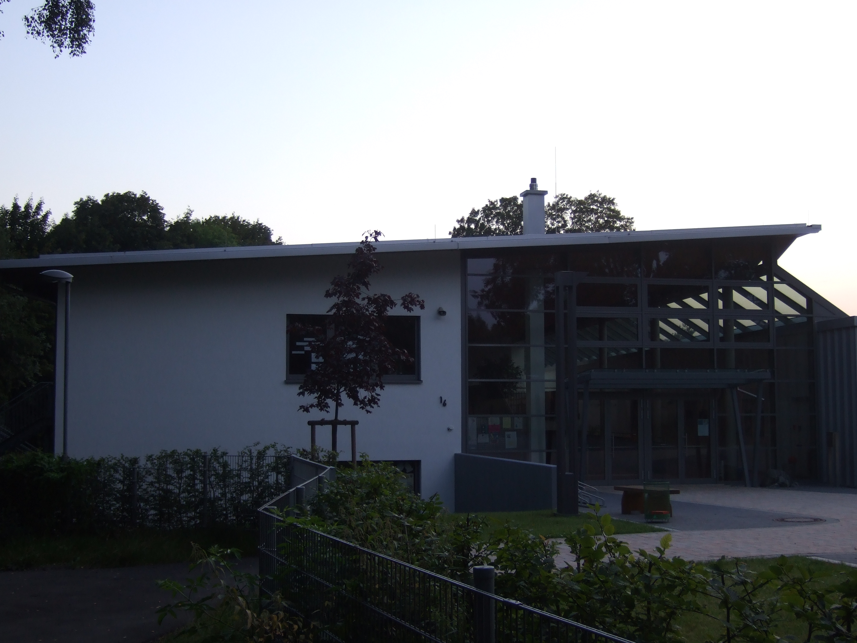 Philipp-Schubert-Schule, Grundschule in Wetzlar-Hermannstein